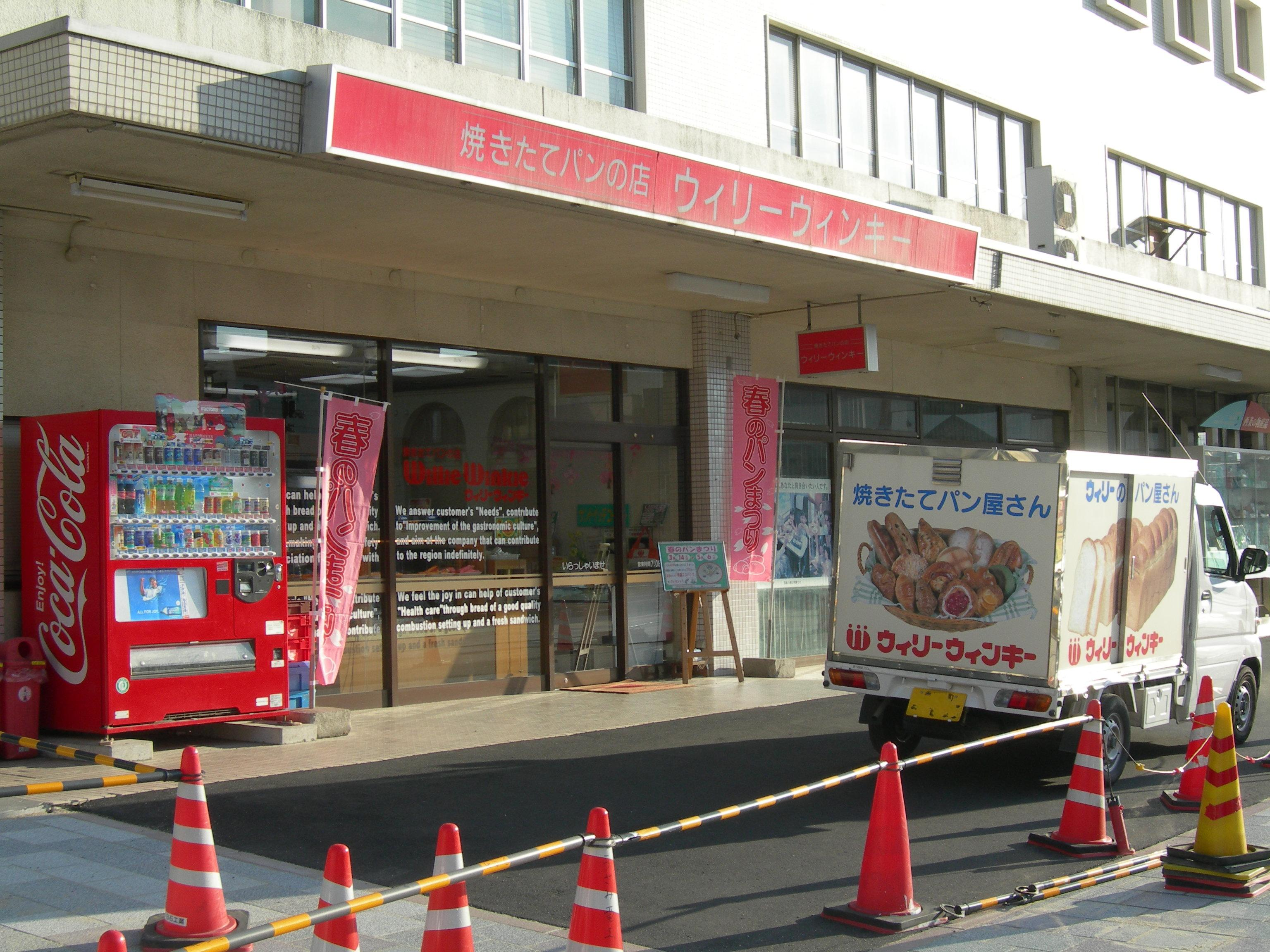 伊予西条駅にある「ウィリーウィンキー」